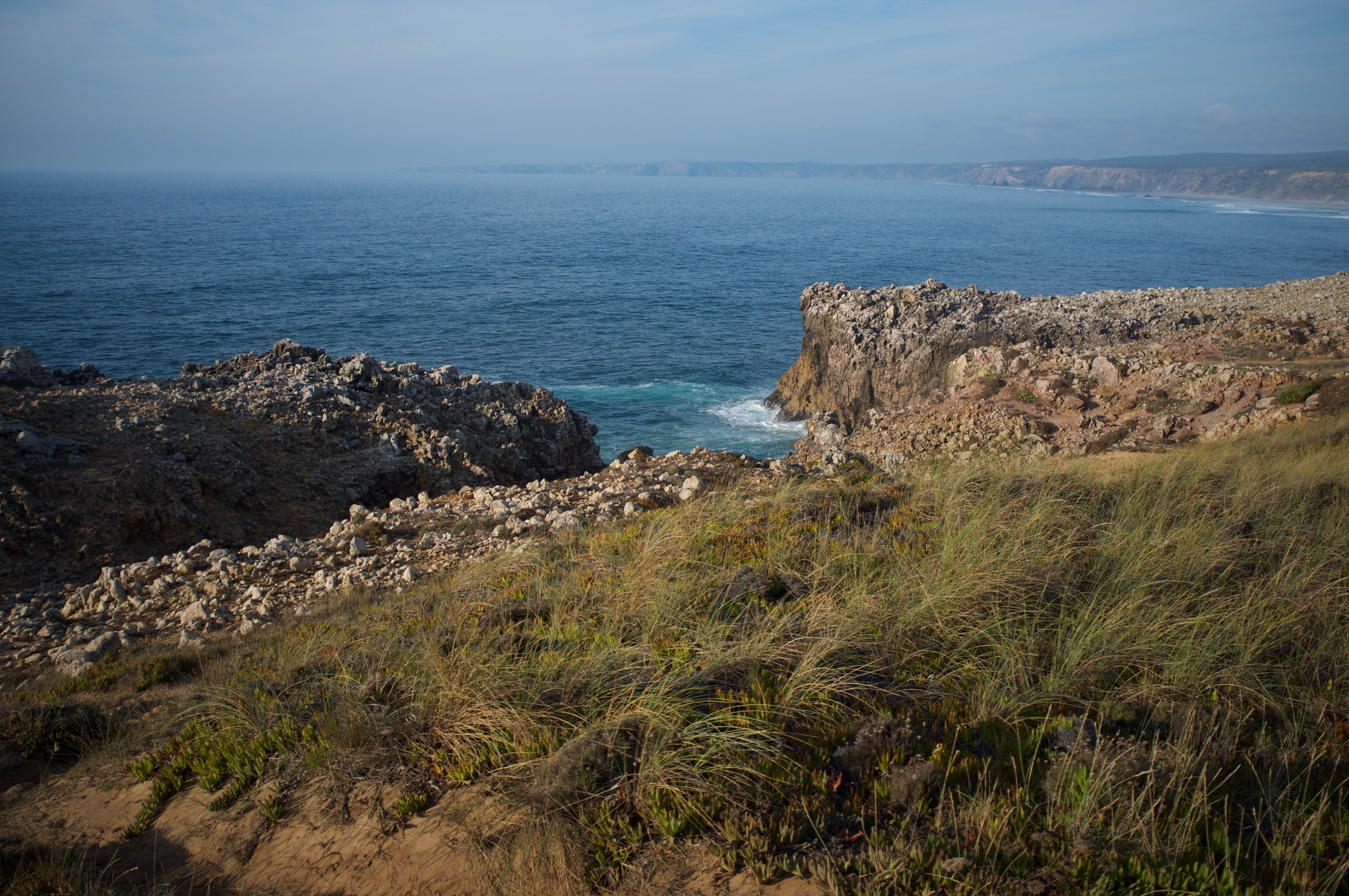 Bordeira